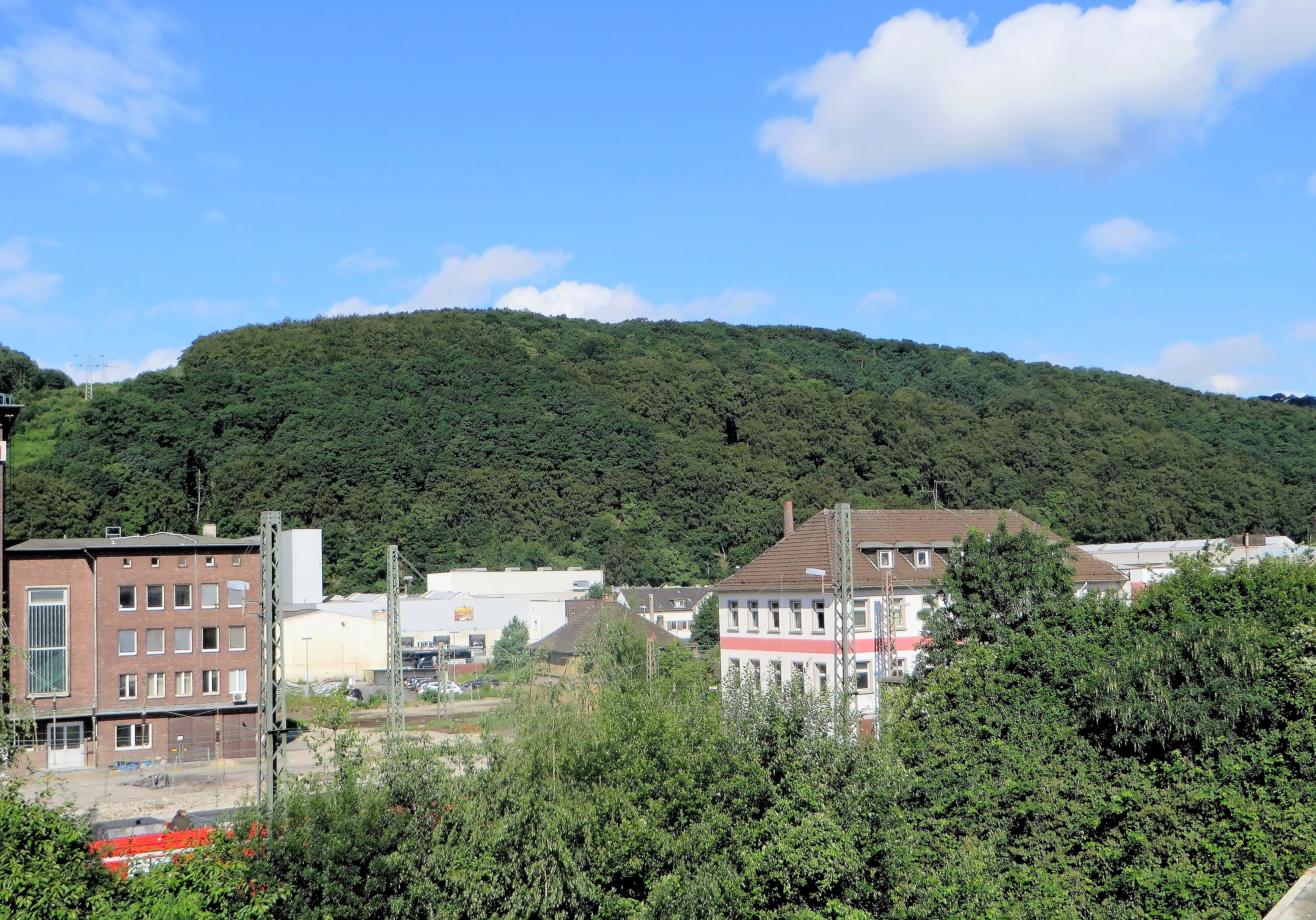 Landschaftsschutzgebiet „Tücking, Auf der Halle und Umgebung“ in Hagen, zwischen Eckesey, Kuhlerkamp, Spielbrink, Quambusch und A 1. Es handelt sich um überwiegend bewaldete Flächen, naturnahe Bachtäler und zahlreiche Tümpel und Quellen. Blick von der Eckeseyer Straße auf den östlichen Waldbereich zwischen Philippshöhe und Grüntal.